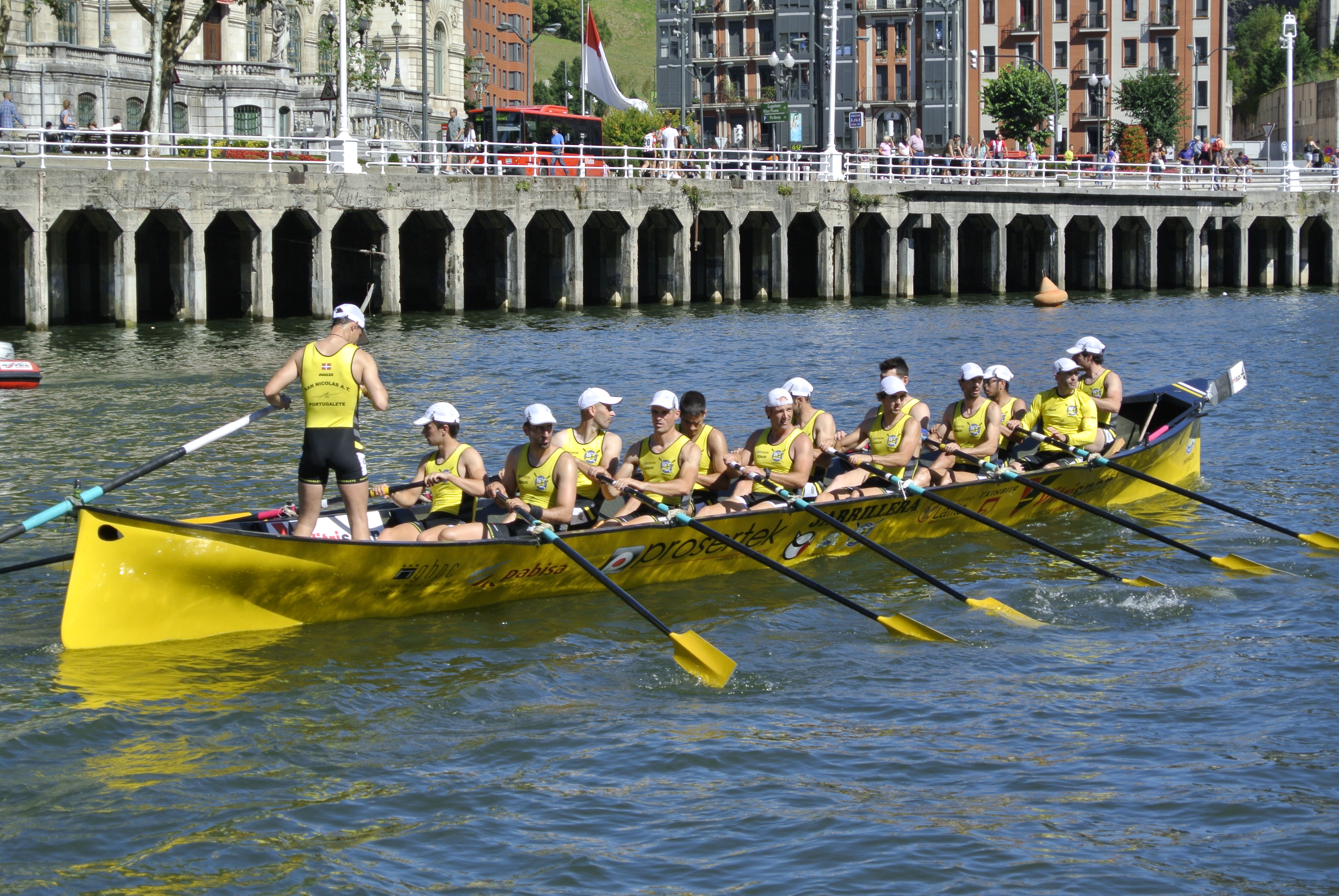 Trainera de Portugalete en Bilbao, última jornada de liga ARC-1